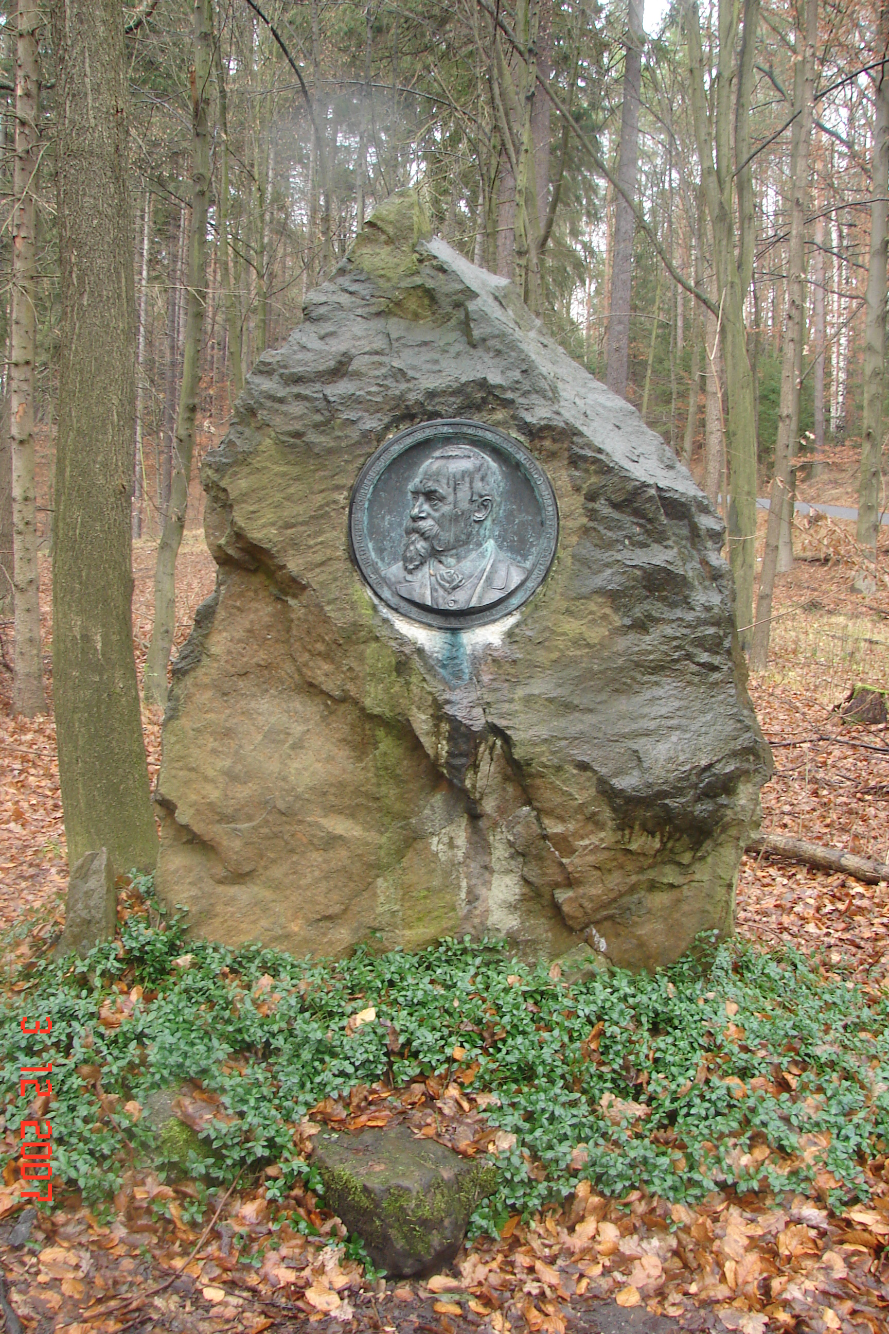 Gedenkstein für den Heidemaler Guido Hammer, nahe der Heidemühle, Dresdner Heide